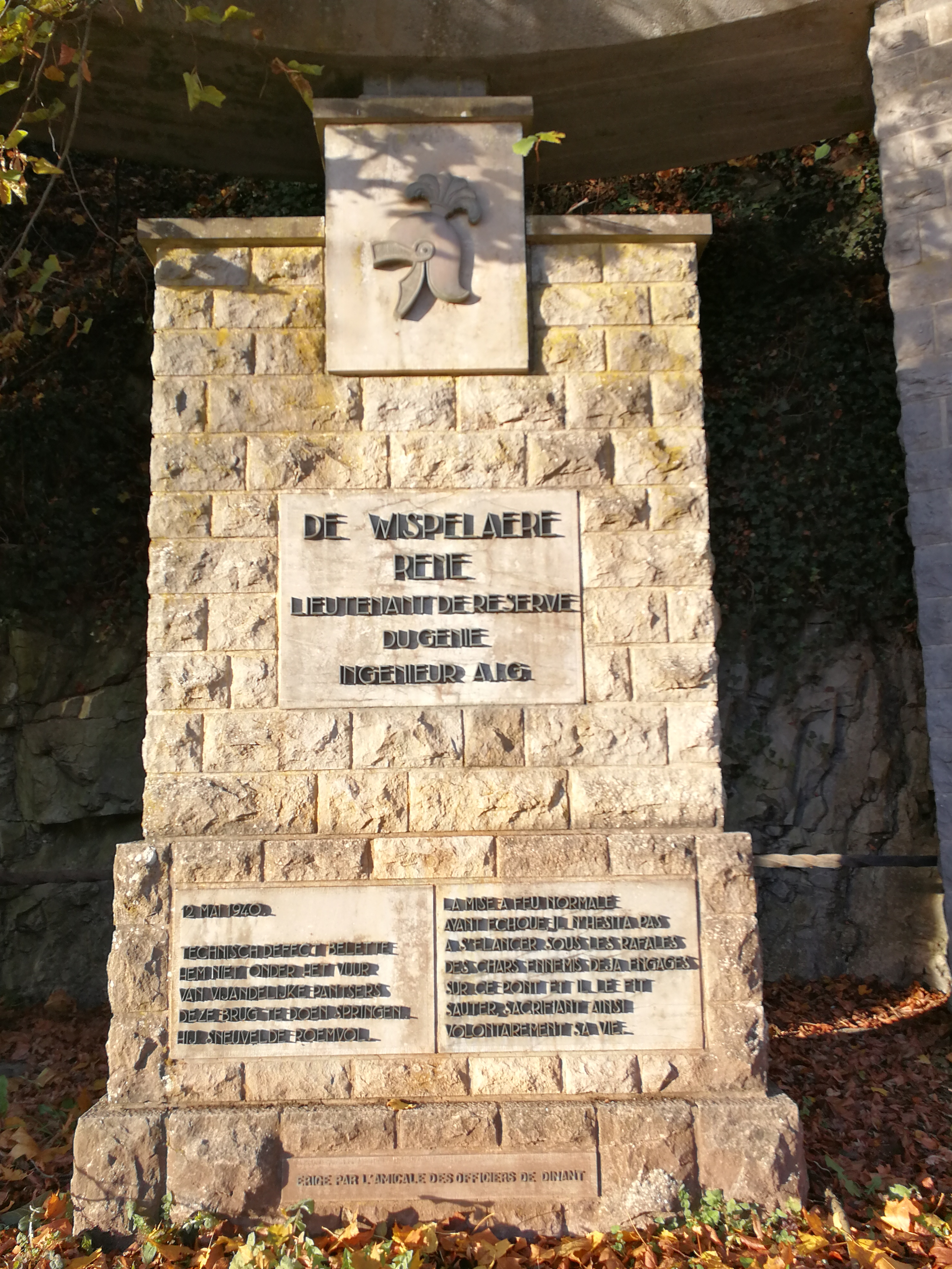 Détail du mémorial en l'honneur du lieutenant de réserve René De Wispelaere, qui a fait sauter le pont au sacrifice de sa vie à l'arrivé des soldats allemands le 12 mai 1940. Il y est inscrit: DE WISPELAERE RENE LIEUTENANT DE RESERVE DU GENIE INGENIEUR A.I.G. 12 mai 1940. LA MISE A FEU NORMALE AYANT ECHOUE IL N'HESITA PAS A S'ELANCER SOUS LES RAFALES DES CHARS ENNEMIS DEJA ENGAGES SUR CE PONT ET IL LE FIT SAUTER, SACRIFIANT AINSI VOLONTAIREMENT SA VIE Oeuvre par E. Van Treek, Anvers. Erigé par l'amicale des officiers de Dinant. This photo of immovable heritage has been taken in the Walloon Region